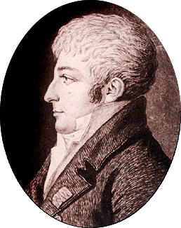 Porträt des Patrice Charles Ghislain de Coninck (* 19. November 1770 in Brügge; † 22. Mai 1827 ebenda), südniederländischer Jurist und Politiker.